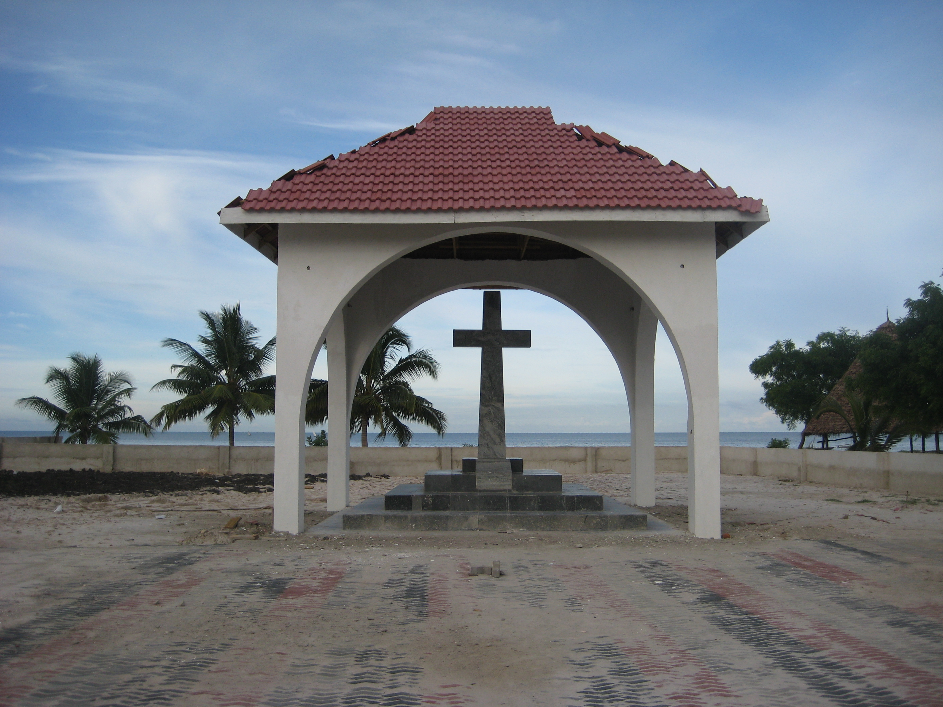 Croce commemorativa che ricorda il punto in cui, nel 1868, padre Antoine Horner, dei Padri dello Spirito Santo, giunse sulla terraferma da Zanzibar, per fondare a Bagamoyo la missione più antica della Tanzania. Una scritta ai piedi della croce recita: HAPA NDIPO Pd. [Padri] A. [Antoine] HORNER ALIPOPANDISHA MSALABA MNAMO MWAKA 1868 TOKA HAPA UKRISTU ULIENEA BARA LA AFRIKA MASHARIKI Sulla croce sta invece la scritta MUNGU ANEEMESHE AFRIKA